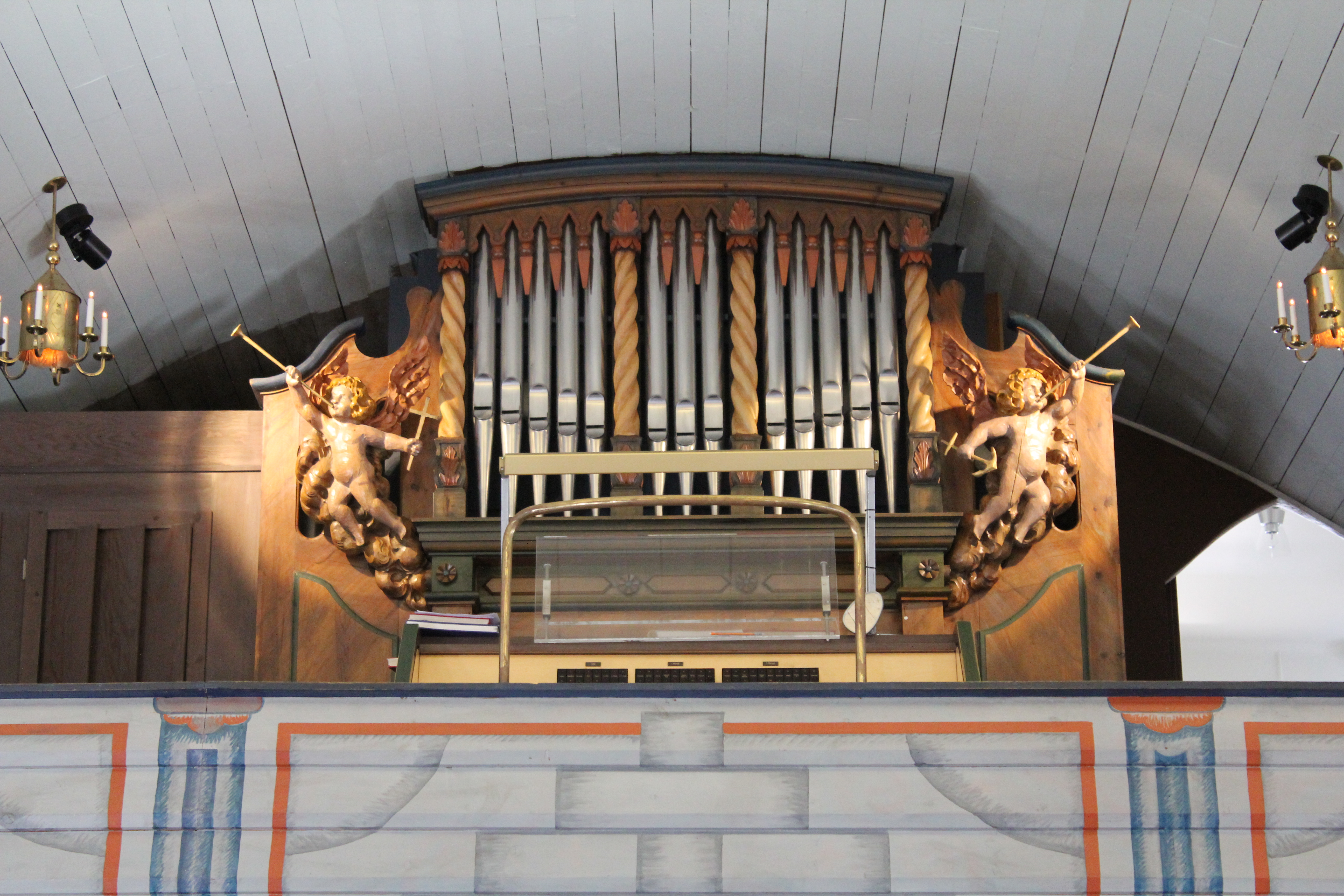 Enskede kyrka. Orgelläktaren.